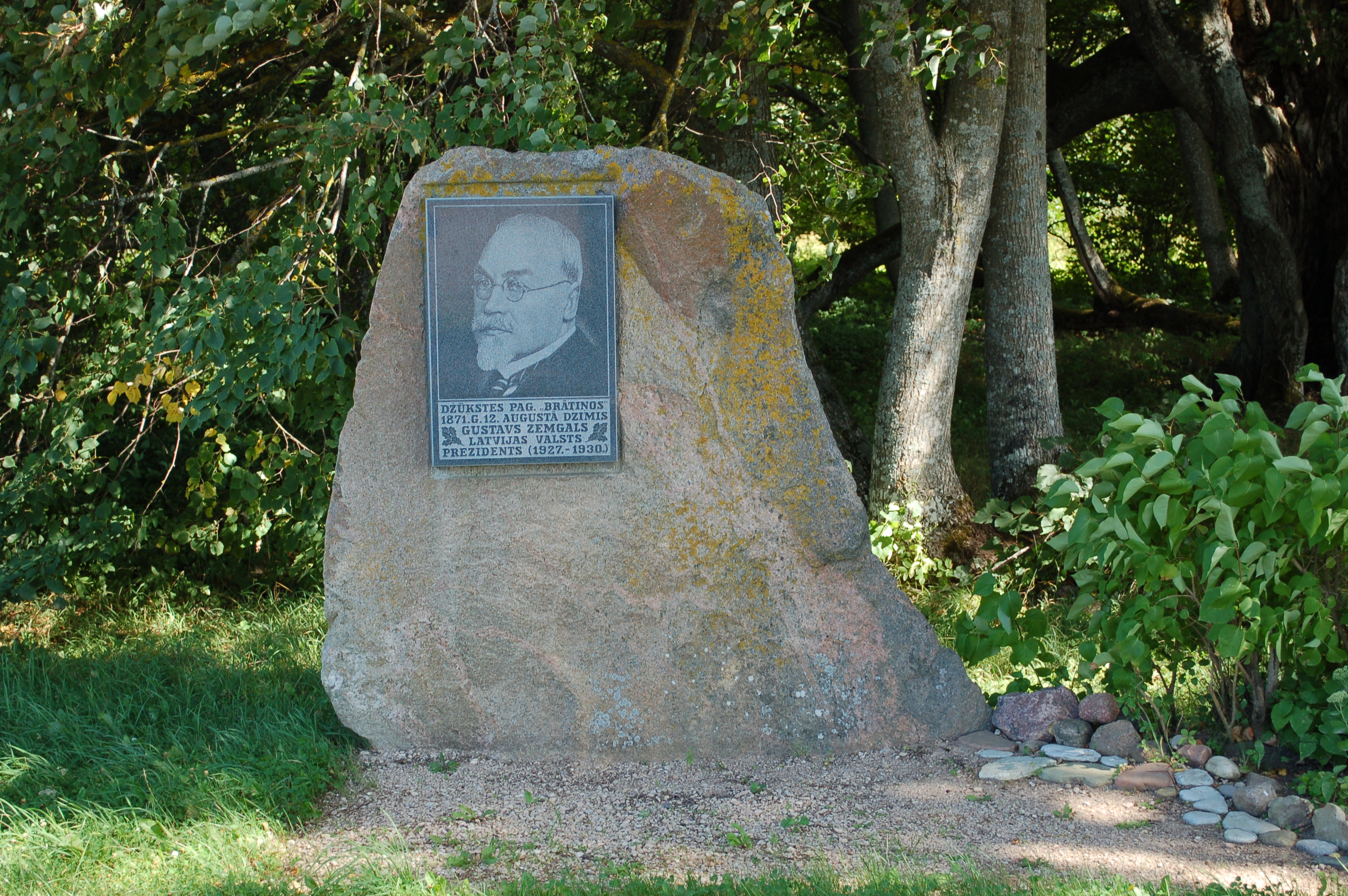 Gustavs Zemgals memorial (Džūkste)